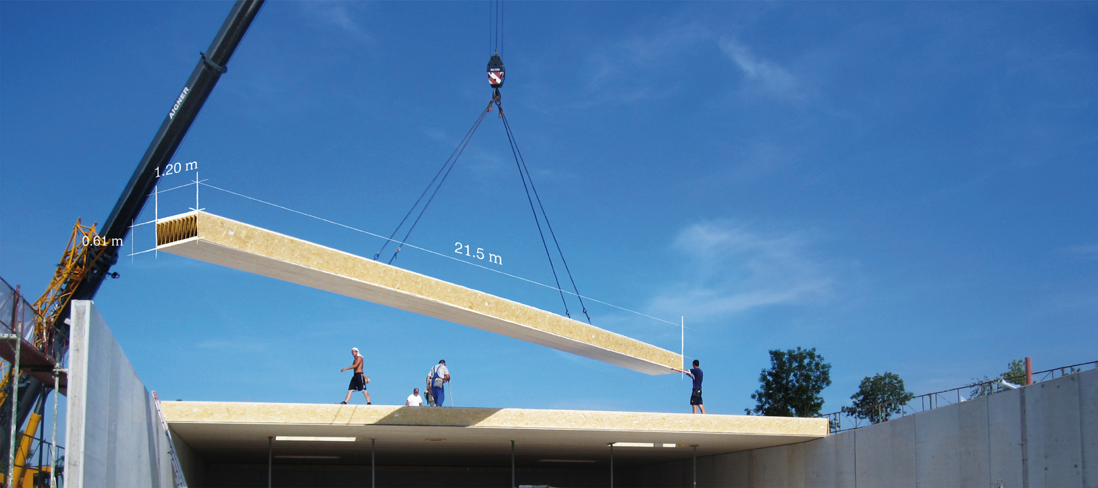 Gezielter Materialeinsatz führt zur signifikanten Reduktion des Eigengewichts der Kielsteg Elemente.